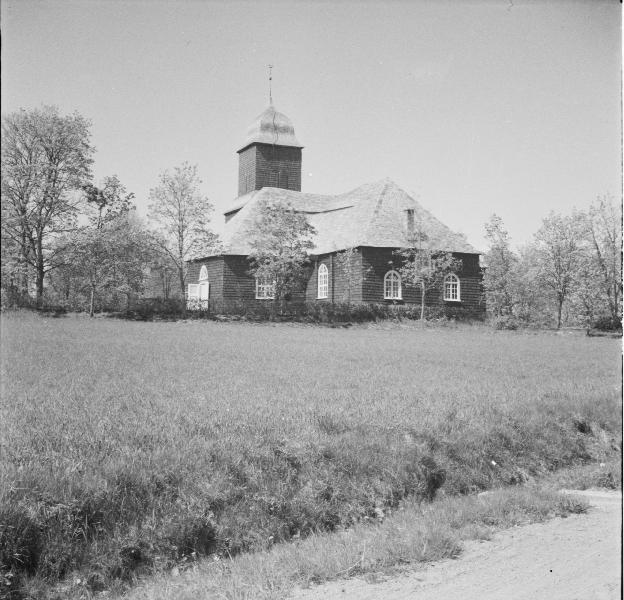 Kyrkan från sydöst. Kategori: (01) ExteriörerKyrkan från sydöst.